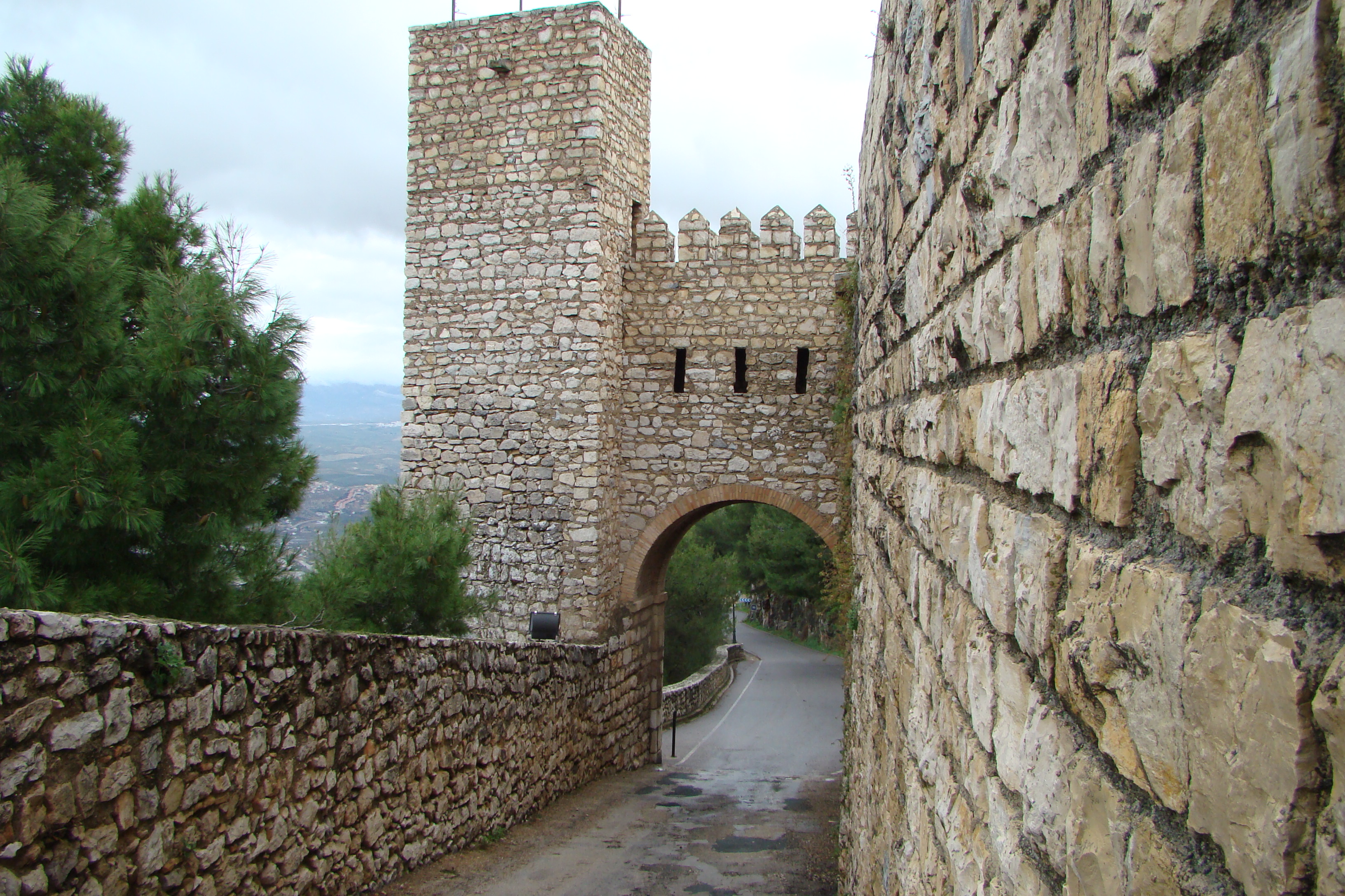 Arco de entrada al recinto del Castillo de Jén